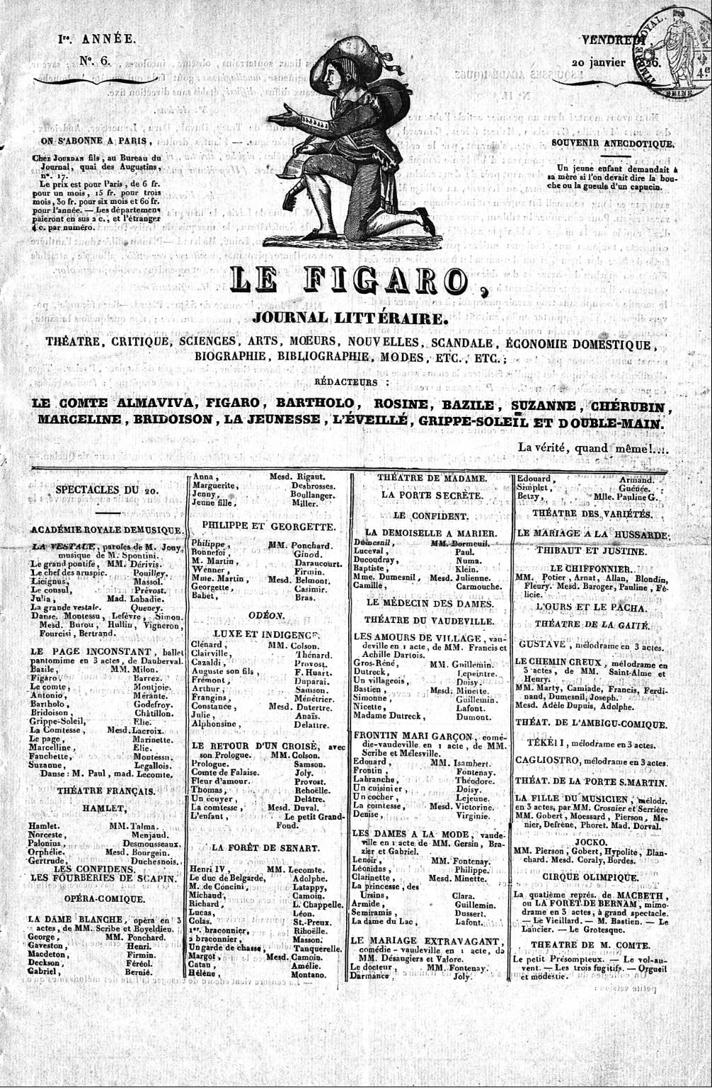 Premier numéro du Figaro